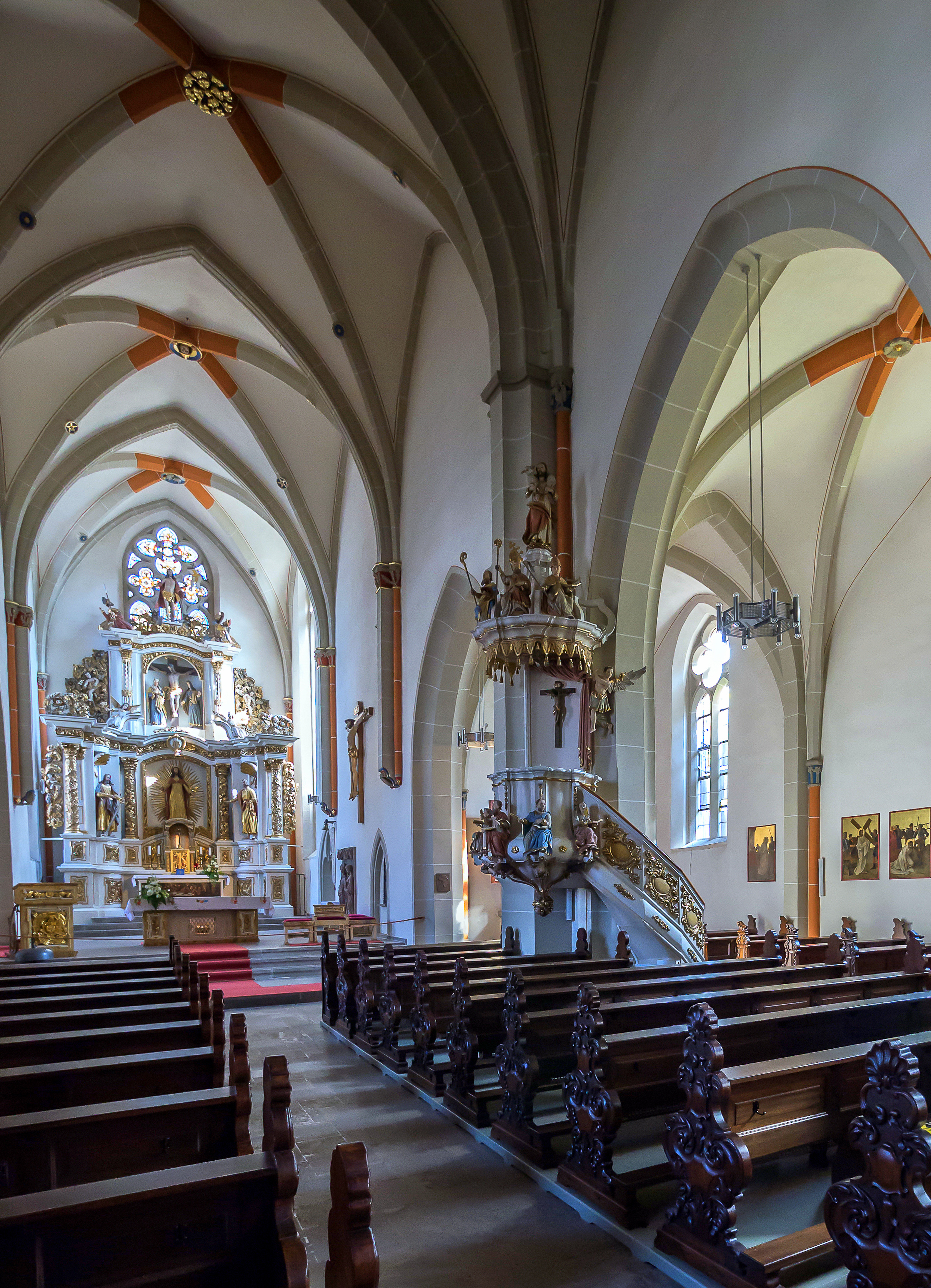 Heilbad Heiligenstadt Neustädter Kirchgasse 5 St. Ägidien Pfarrkirche (katholisch) Ausstattung,der barocke Hochaltar von 1498 stammt aus der Stiftskirche Quedlinburg,er ist im Harzer Barock aus Lindenholz geschnitzt.Der Altar war für den Altarraum zu groß,wurde entsprechend angepaßt und 1944 eingebaut.Die Barockkanzel aus dem 17.Jahrhundert.Unten die vier Evangelisten.Die abendländischen Kirchenlehrer Pabst Gregor,St.Augustinus,St.Hieronymus sind auf dem Schalldeckel zu sehen.Die Kanzel wird vom Bild des guten Hirten gekrönt.